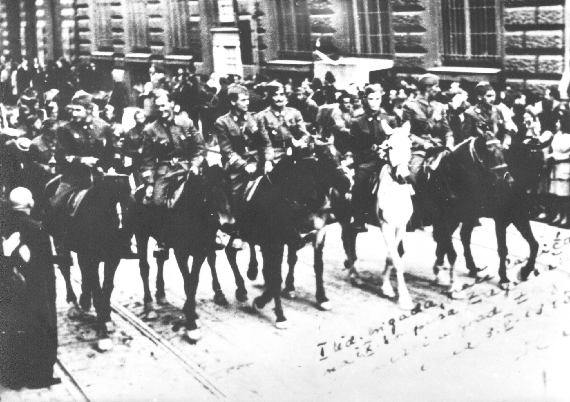 Srpskohrvatski / српскохрватски: Partizani prve udarne brigade "Braća Radić" na čelu 10. korpusa ulaze u oslobođeni Zagreb 9. maja 1945.